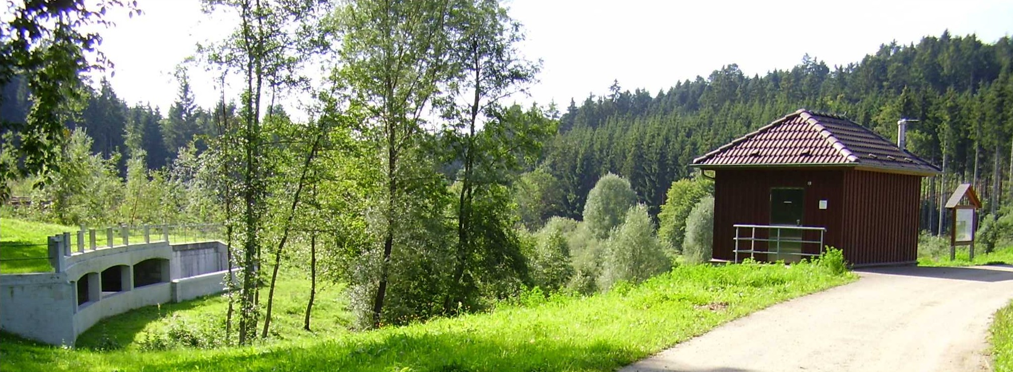 Hochwasserrückhaltebecken mit Überlauf in der Nähe von Täferrot, Baden Württemberg, Deutschland